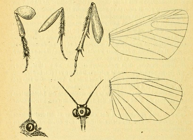 Maradana vidualis, original drawings